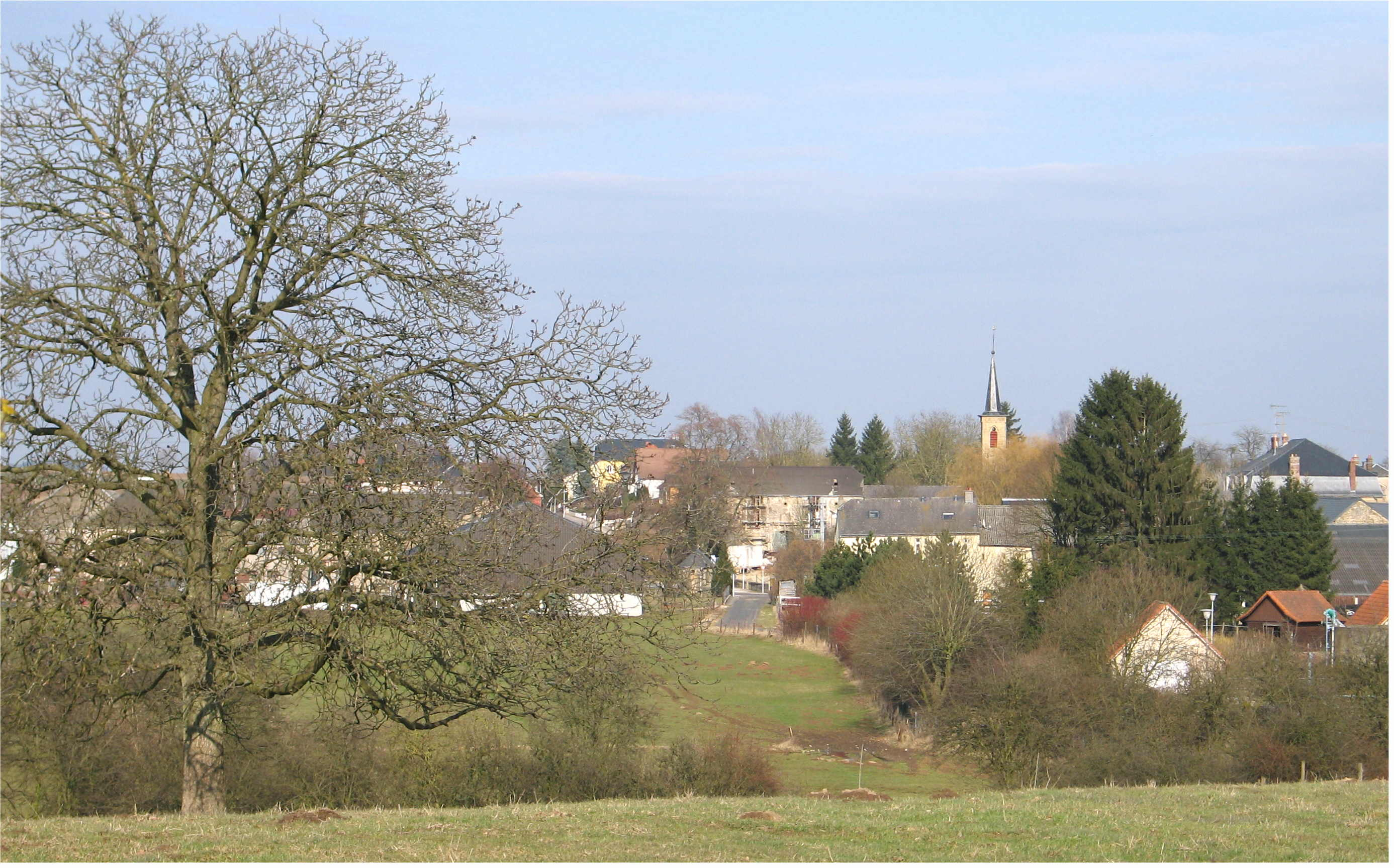 Eeschweller.